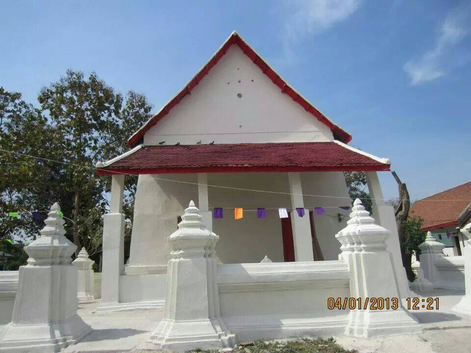 โบสถ์วัดไผ่ล้อม